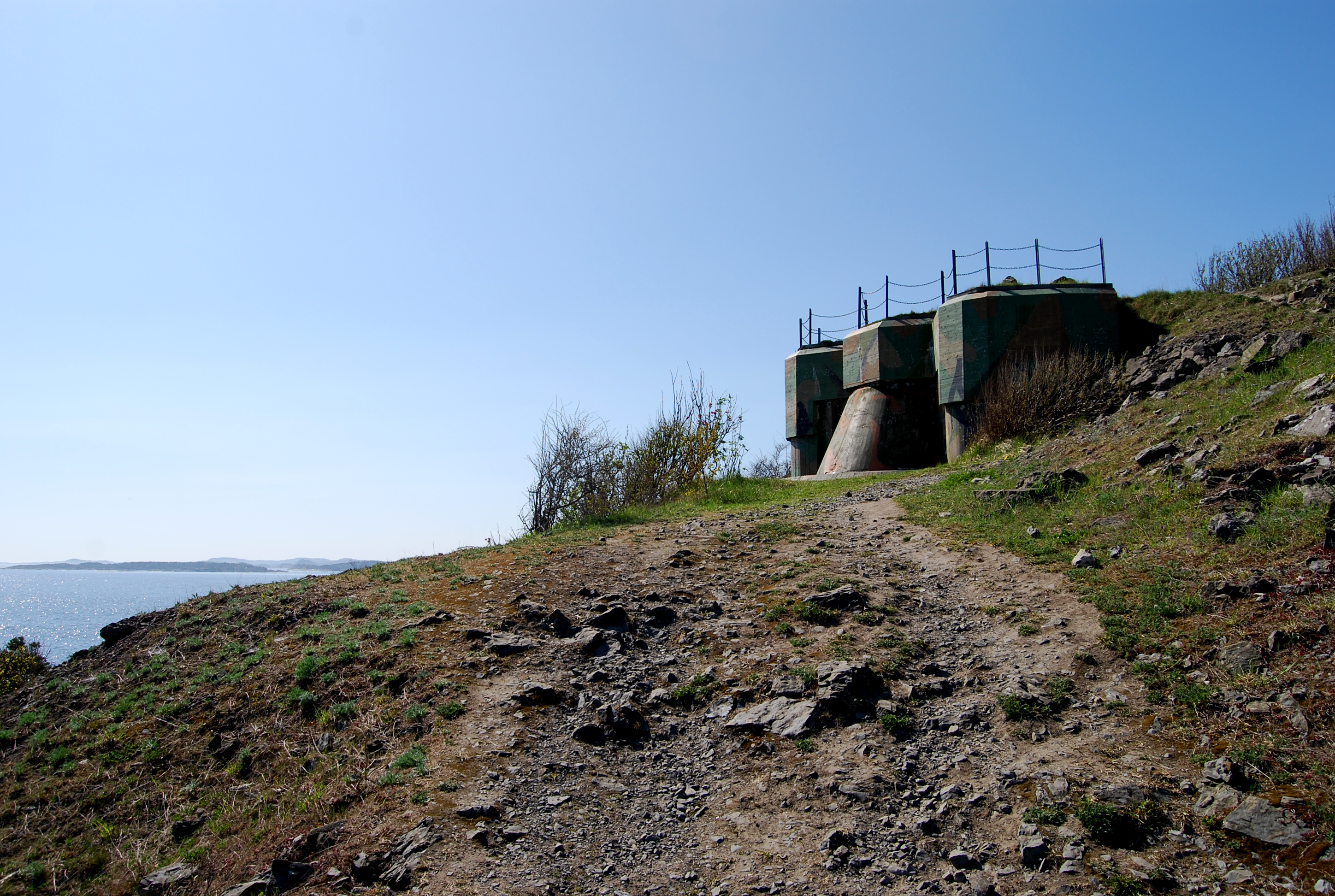 HKB Langesund (1941-1945) / Tangen Fort (1945-1993)